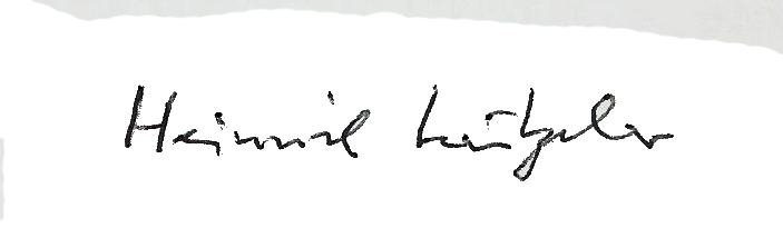 Heinrich Lützeler. Signatur seines Briefes vom 13.10.1977 an mich.